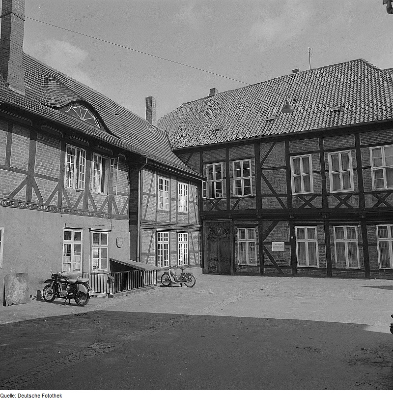 Original image description from the Deutsche Fotothek Schwerin. Domhof, erbaut 1514